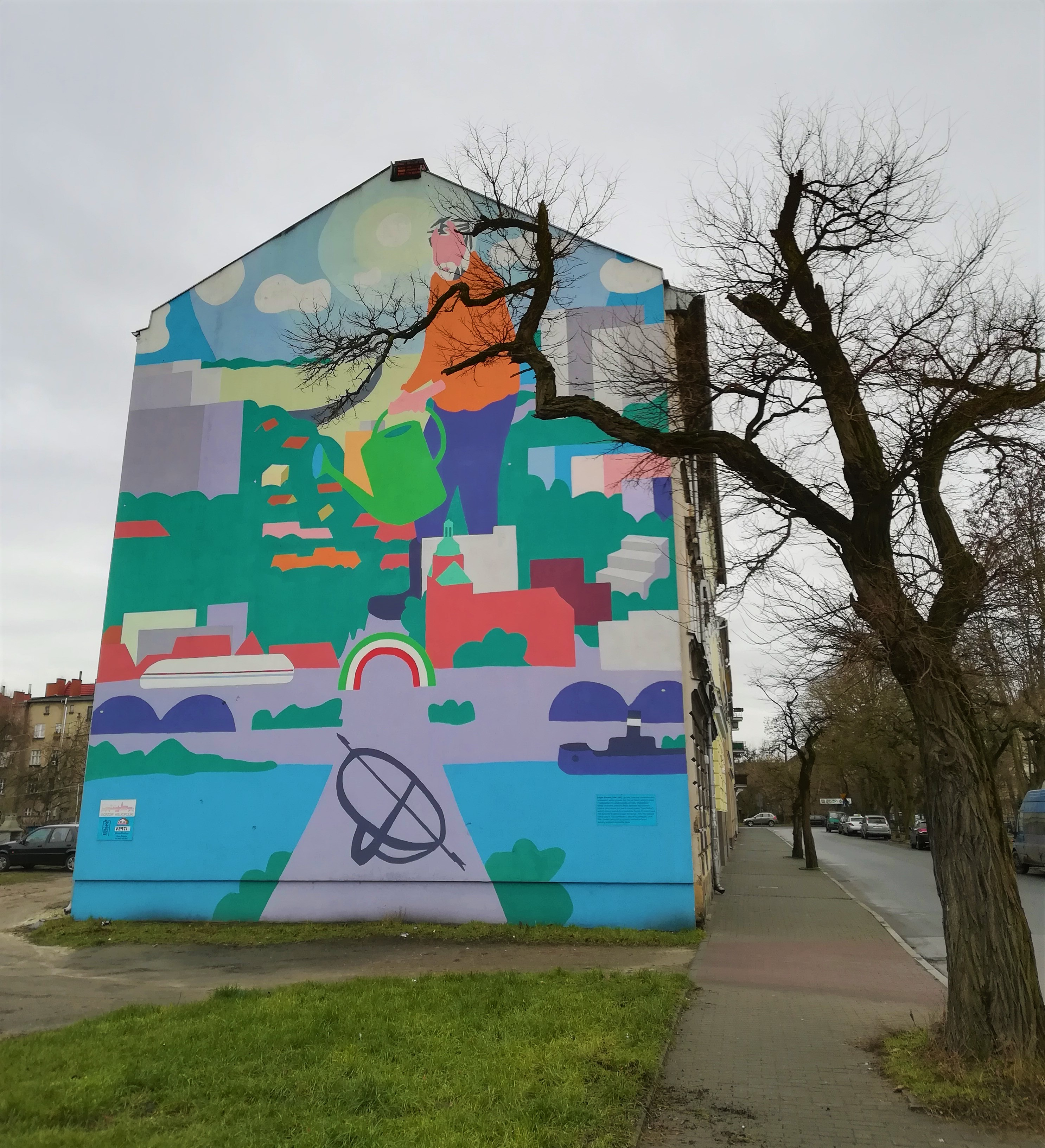 Mural upamiętniający Bożydara Bibrowicza na gorzowskim Zamościu - ul. Kolejowa.